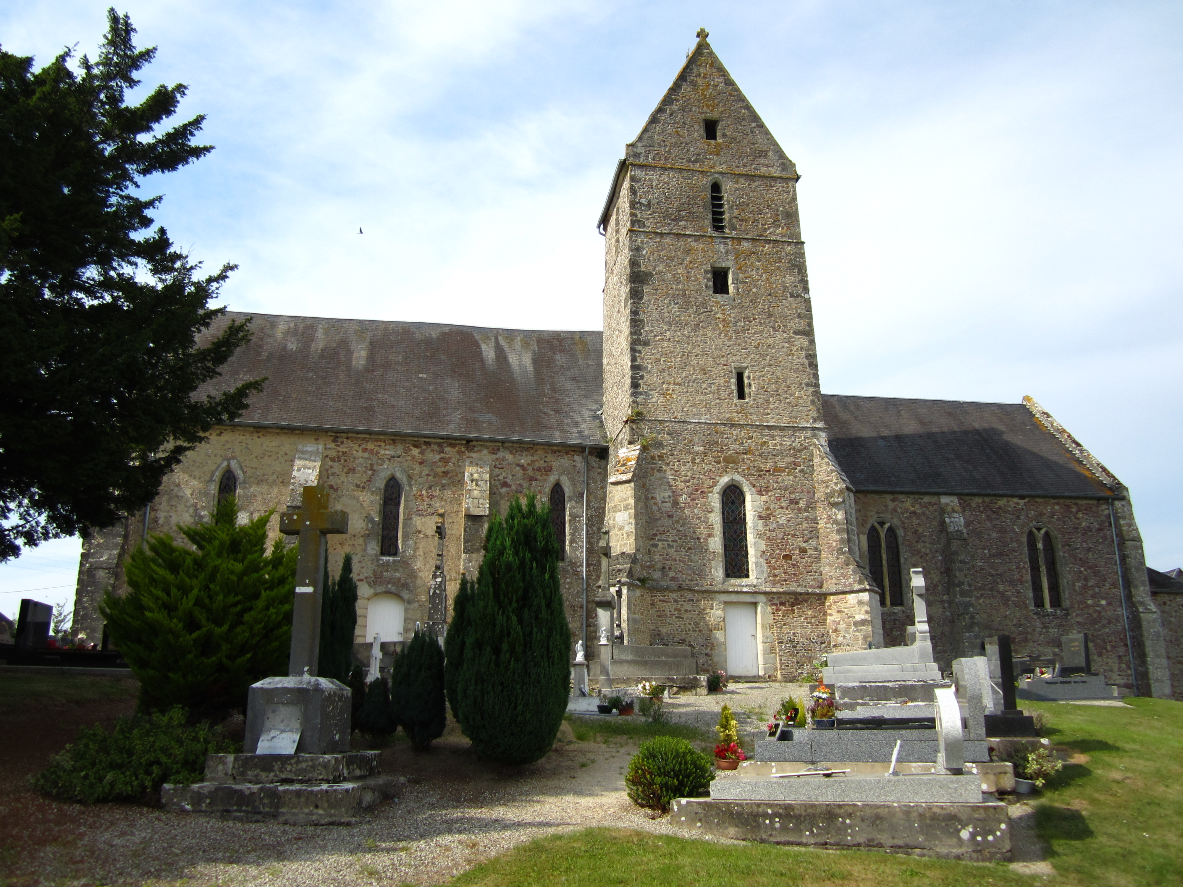 Église Saint-Manvieu de Gonfreville